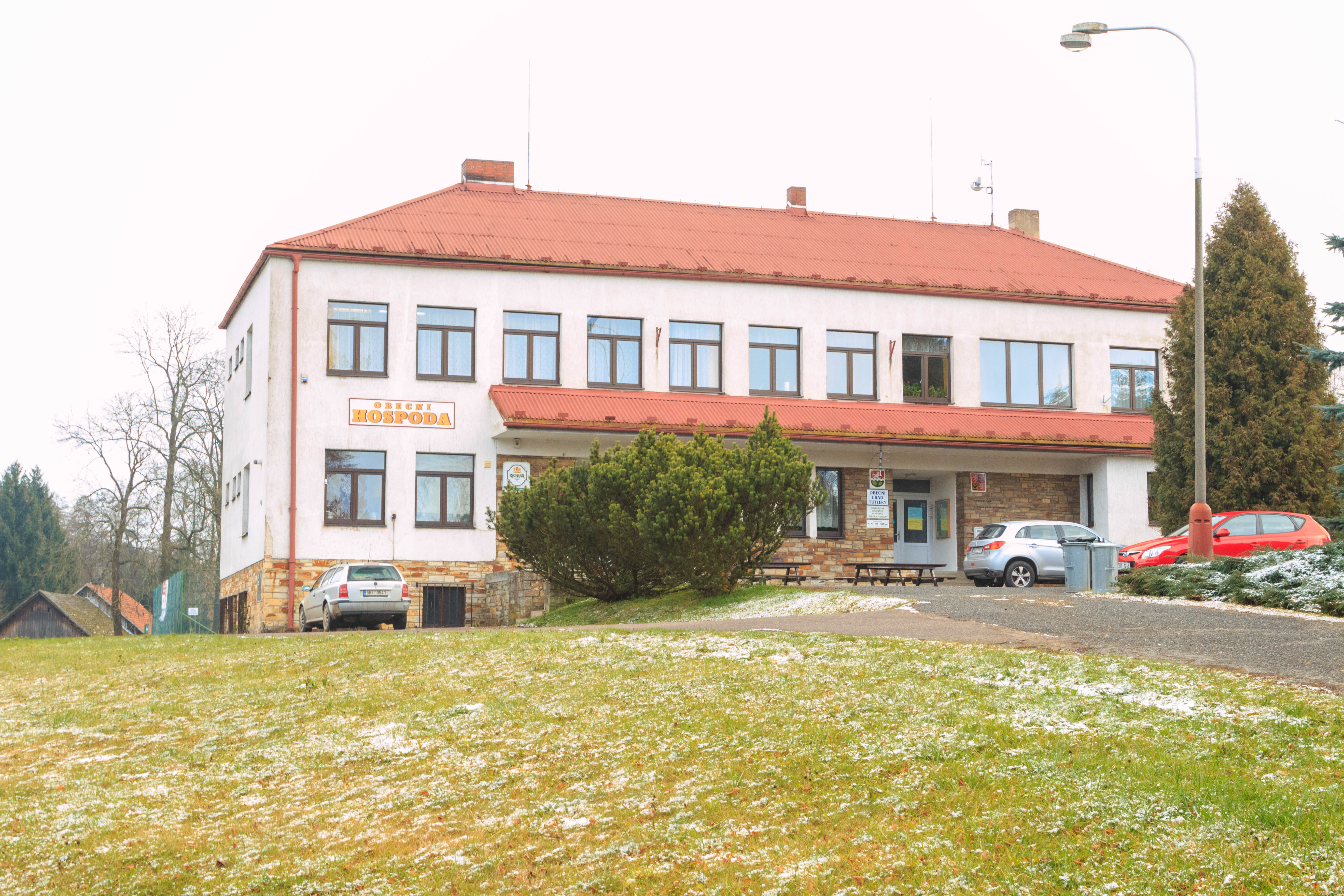 Tutleky - obecní úřad